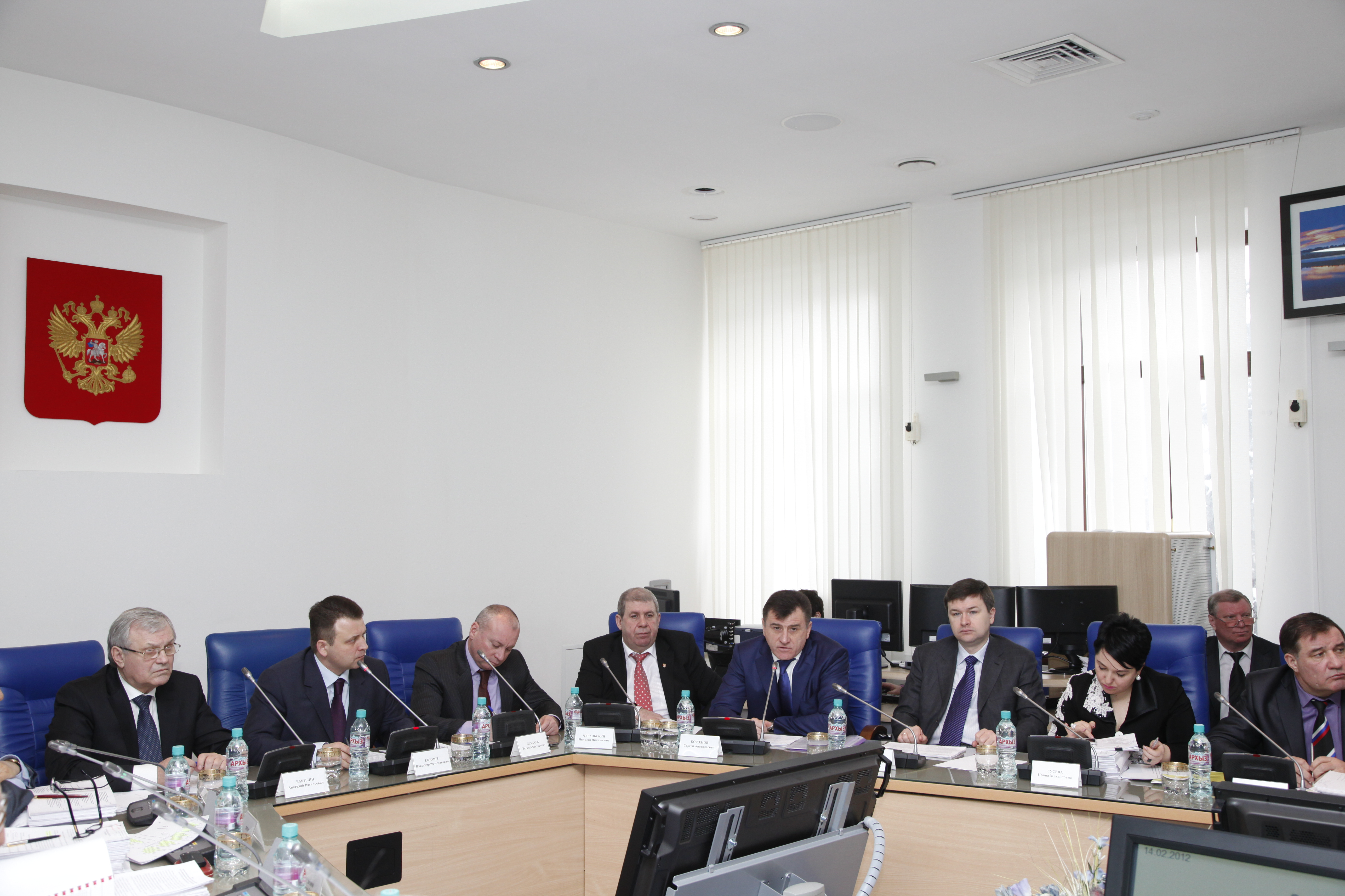 Заседание Волгоградской областной Думы 14 февраля 2012 года по принятию новой редакции Устава Волгоградской области.